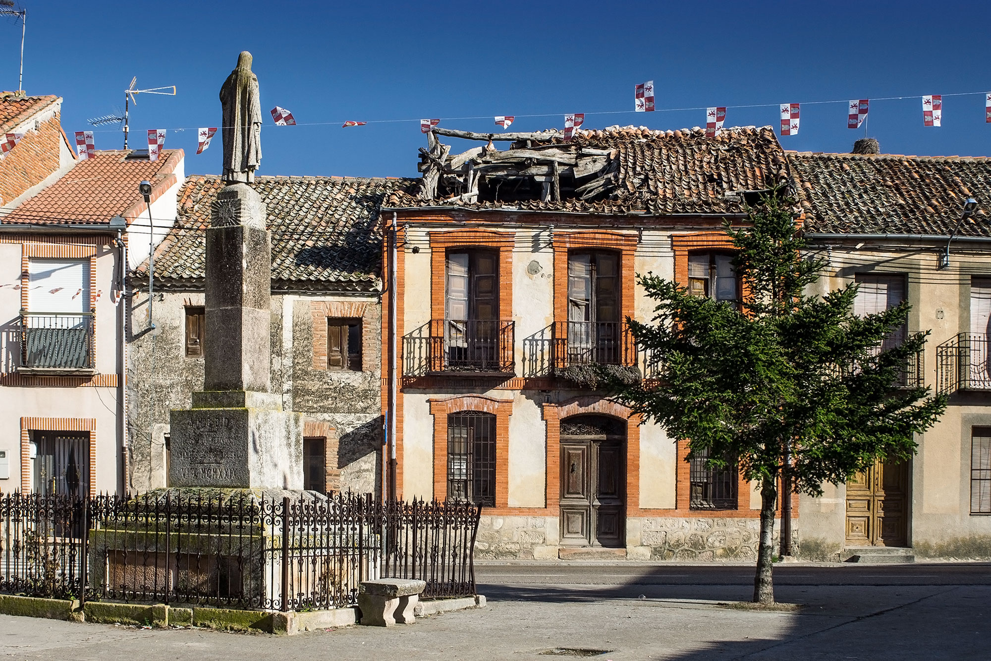 Veganzones, Segovia, España.